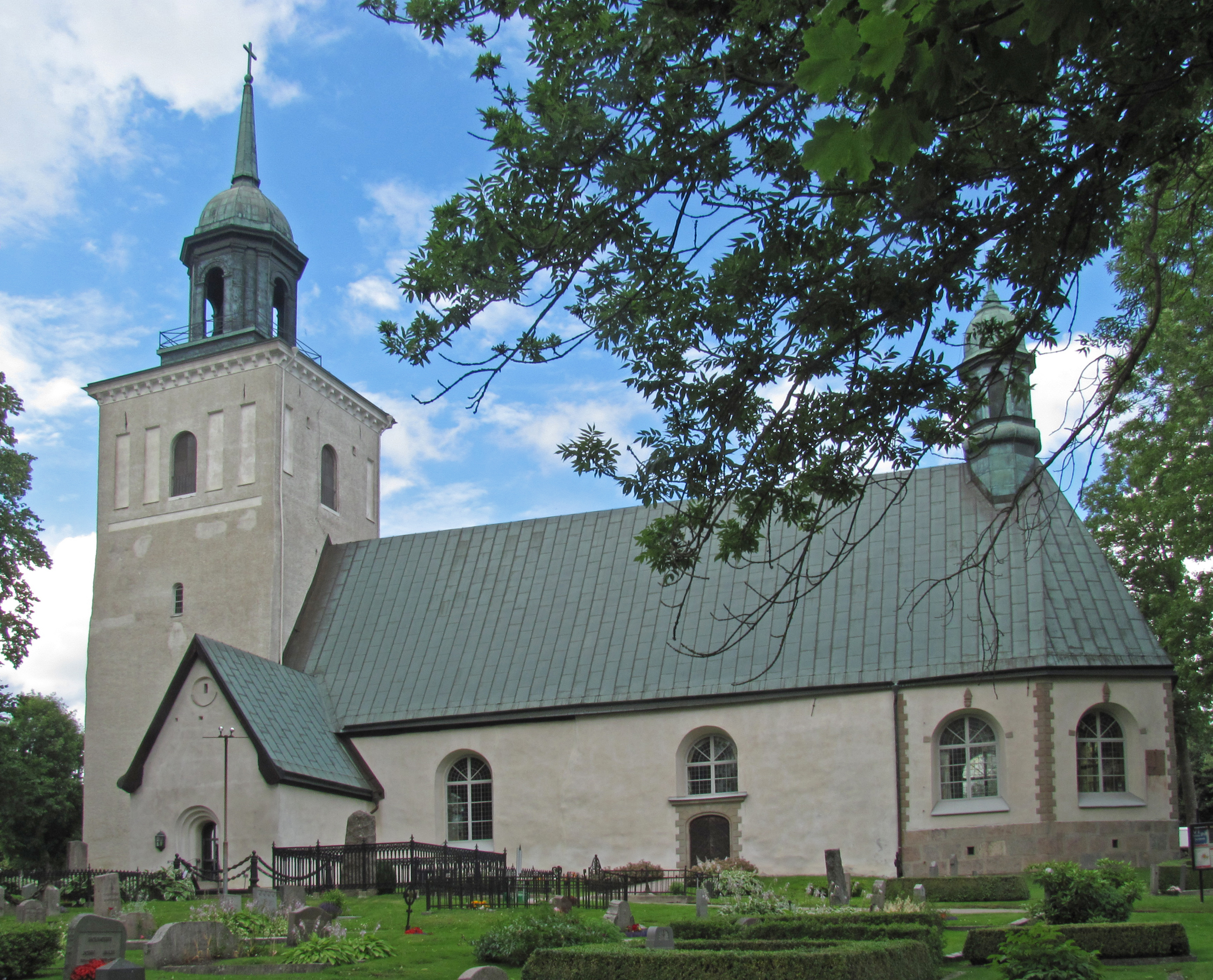 Sollentuna kyrka